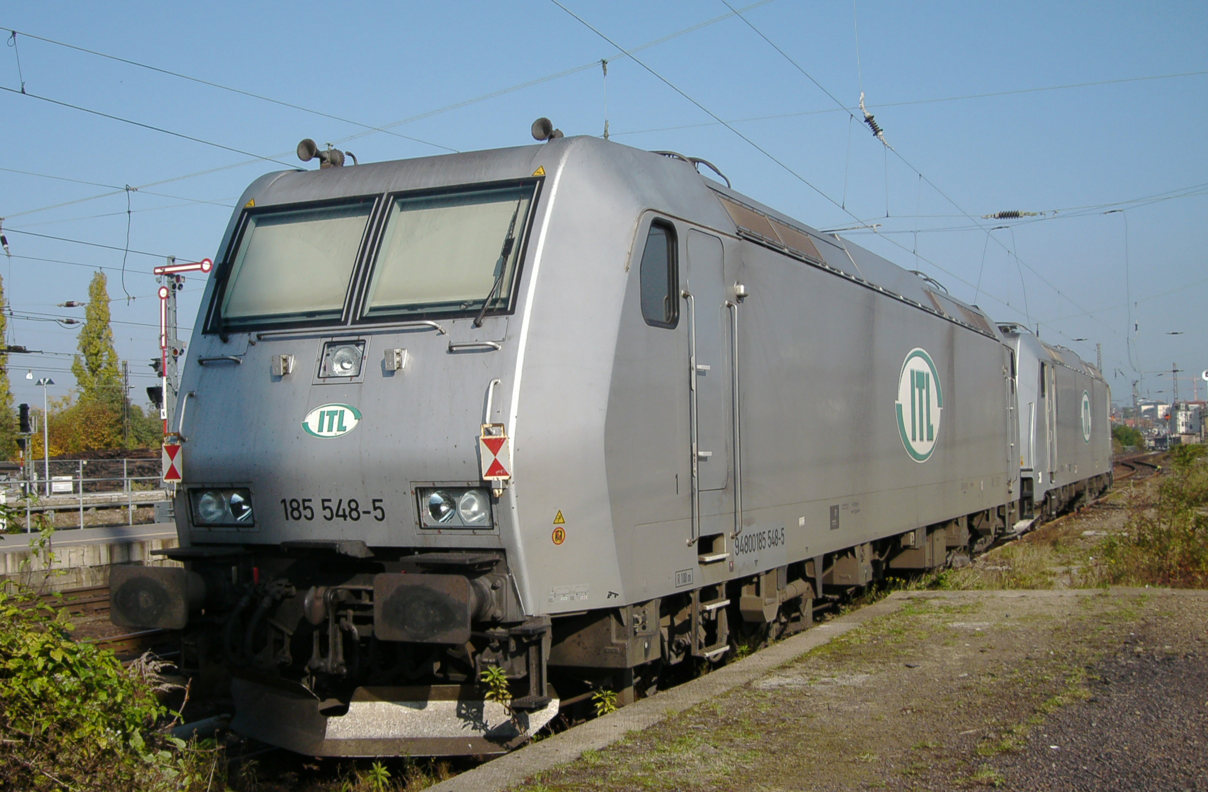 Bombadier-Traxx-Lok 185 548 der ITL-Eisenbahngesellschaft